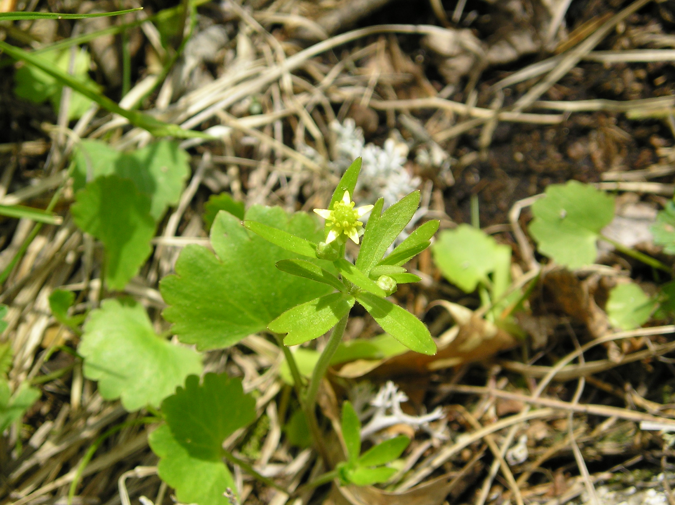 Ranunculus_abortivus_3-eheep